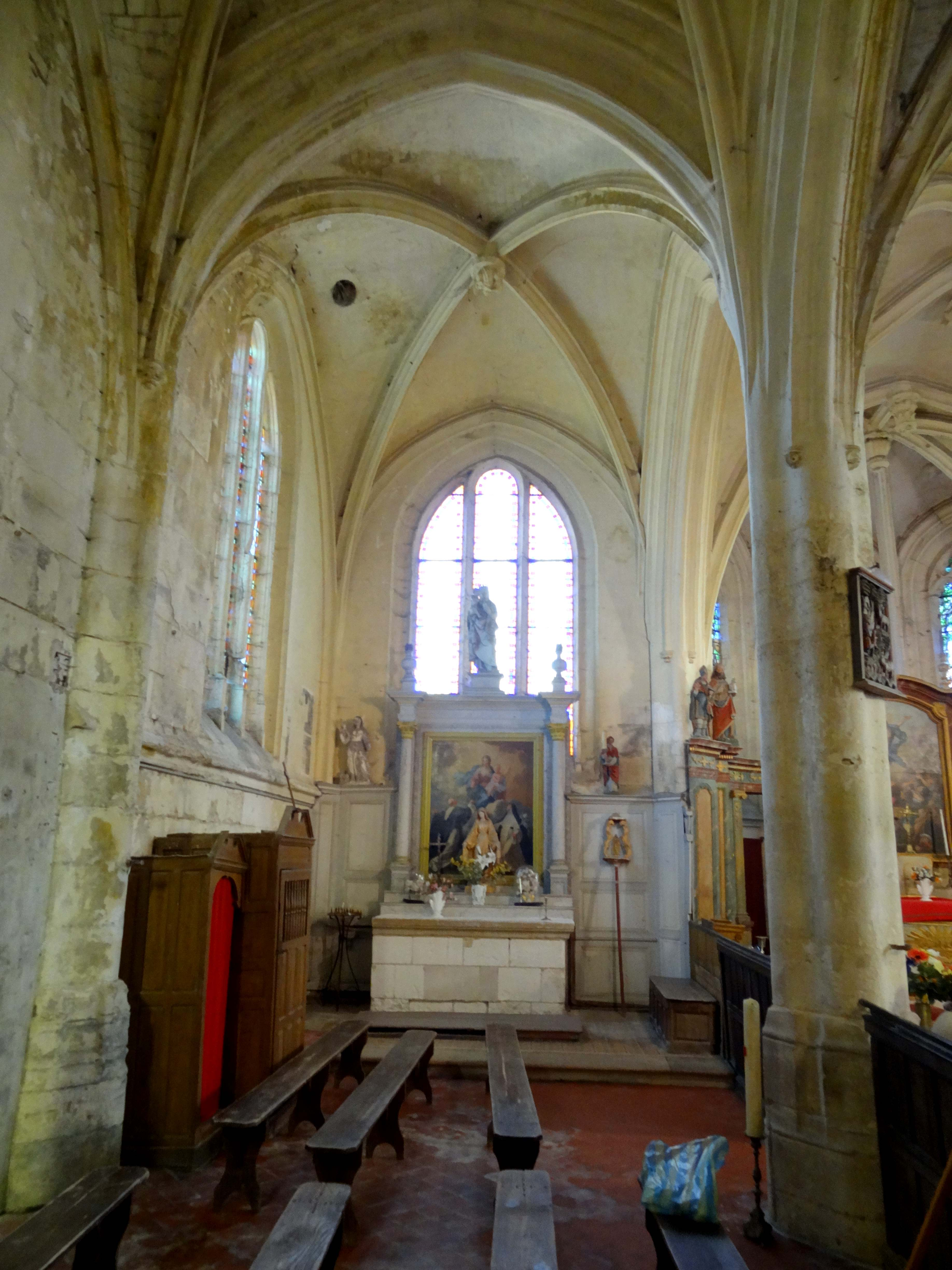 Intérieur de l'église - voir titre.